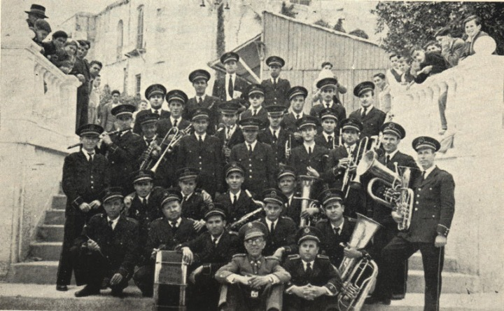 Banda de Cabezo en torno a 1950